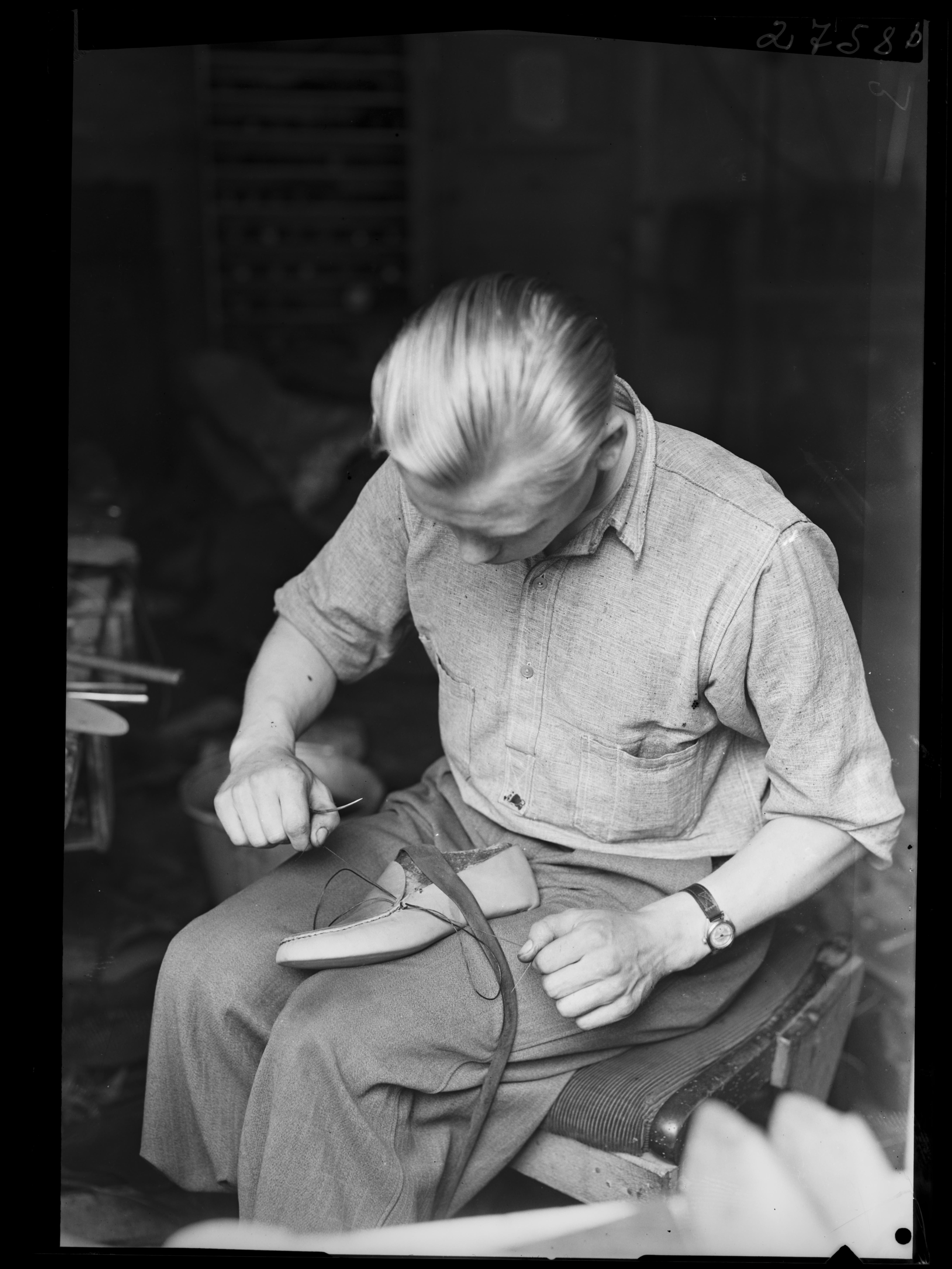 Bildet er hentet fra Nasjonalbibliotekets bildesamling. Anmerkninger til bildet var: Fotograf ukjent. Aurland, Sogn og Fjordane